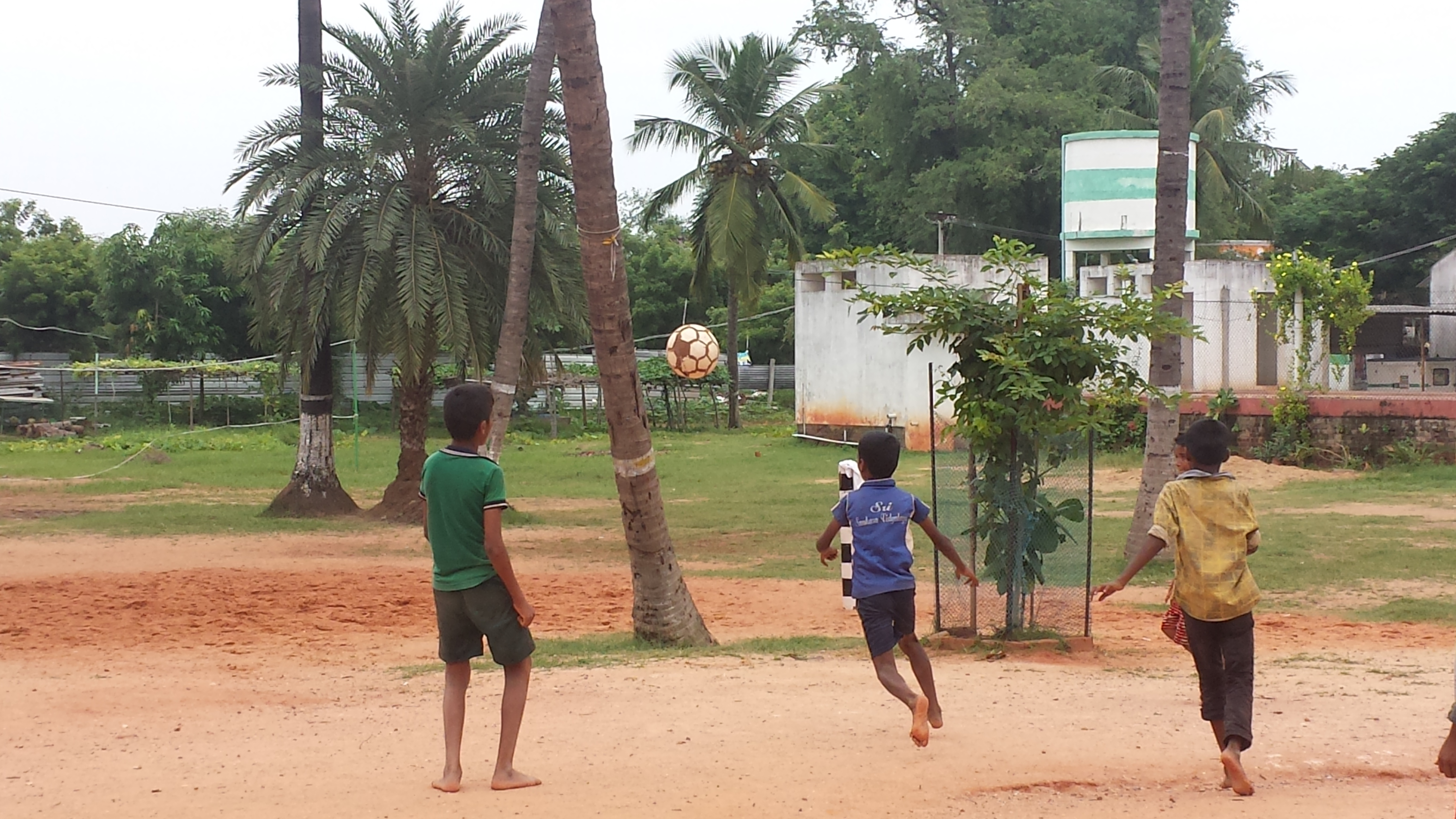 foot